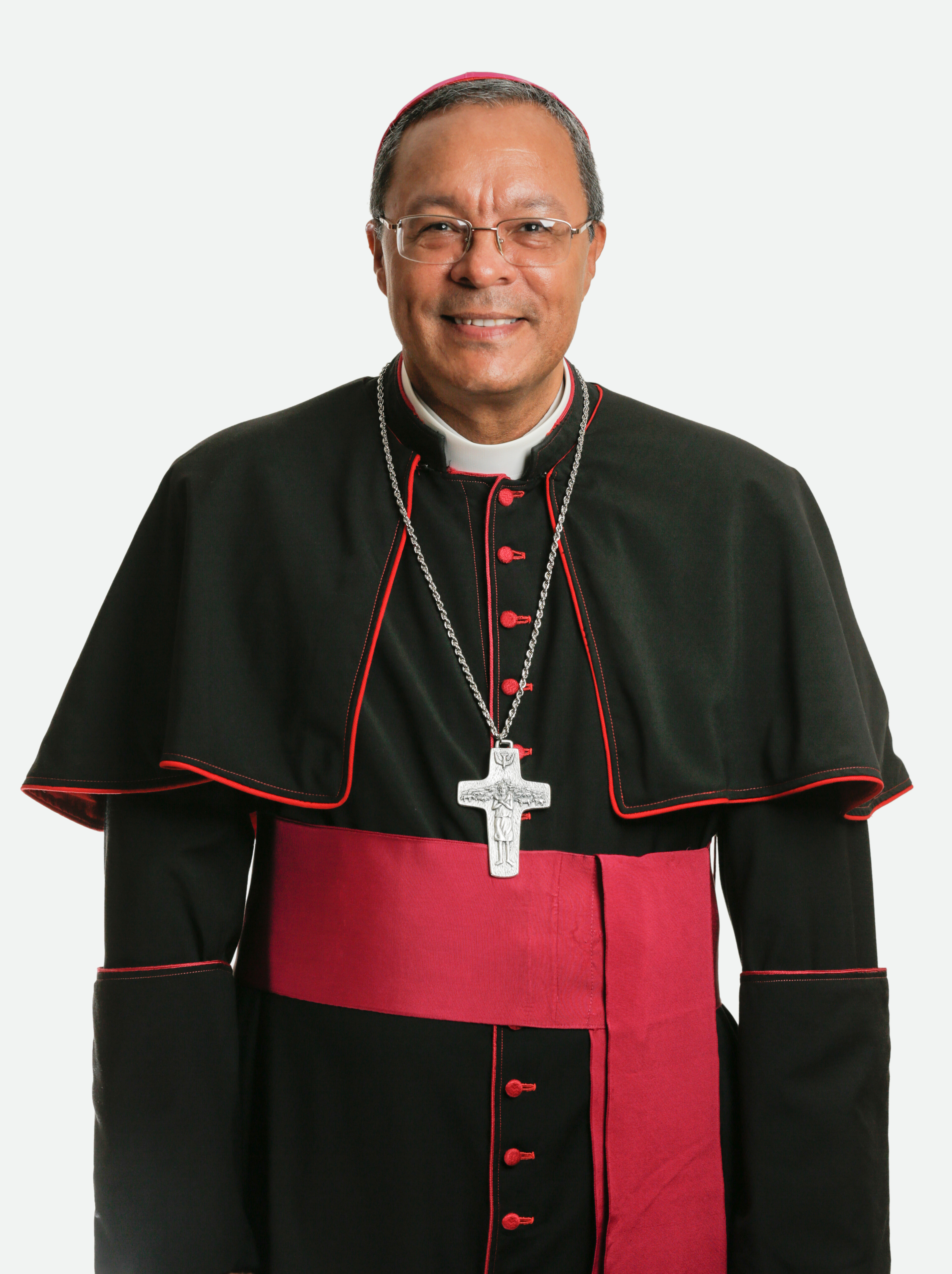 Obispo Auxiliar de Santo Domingo